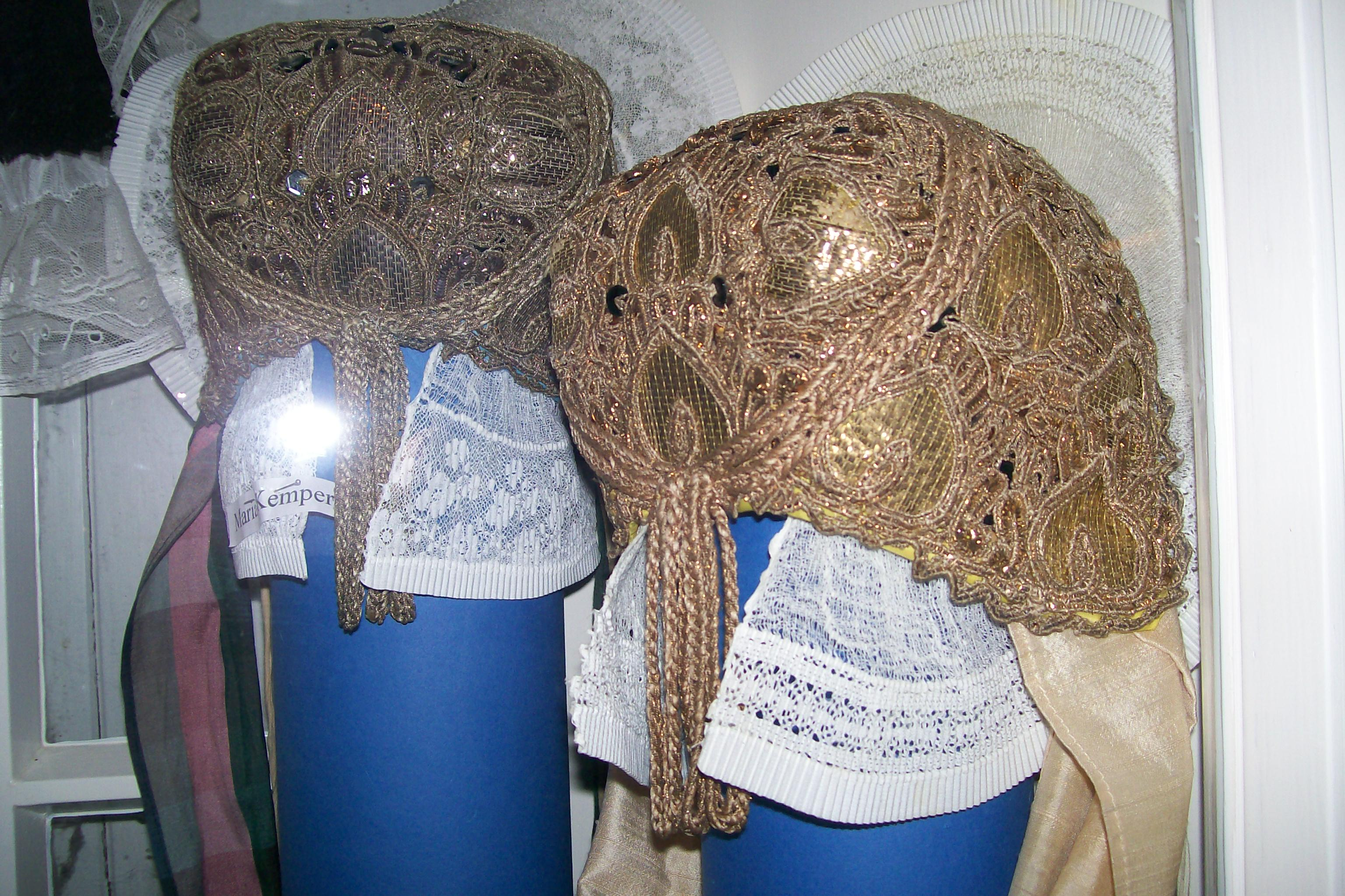 Averbecks Speicher, Heimatmuseum in Bad Iburg-Glane, Exponat Goldhauben, die zur Tracht der verheirateten Glaner Frauen gehörten